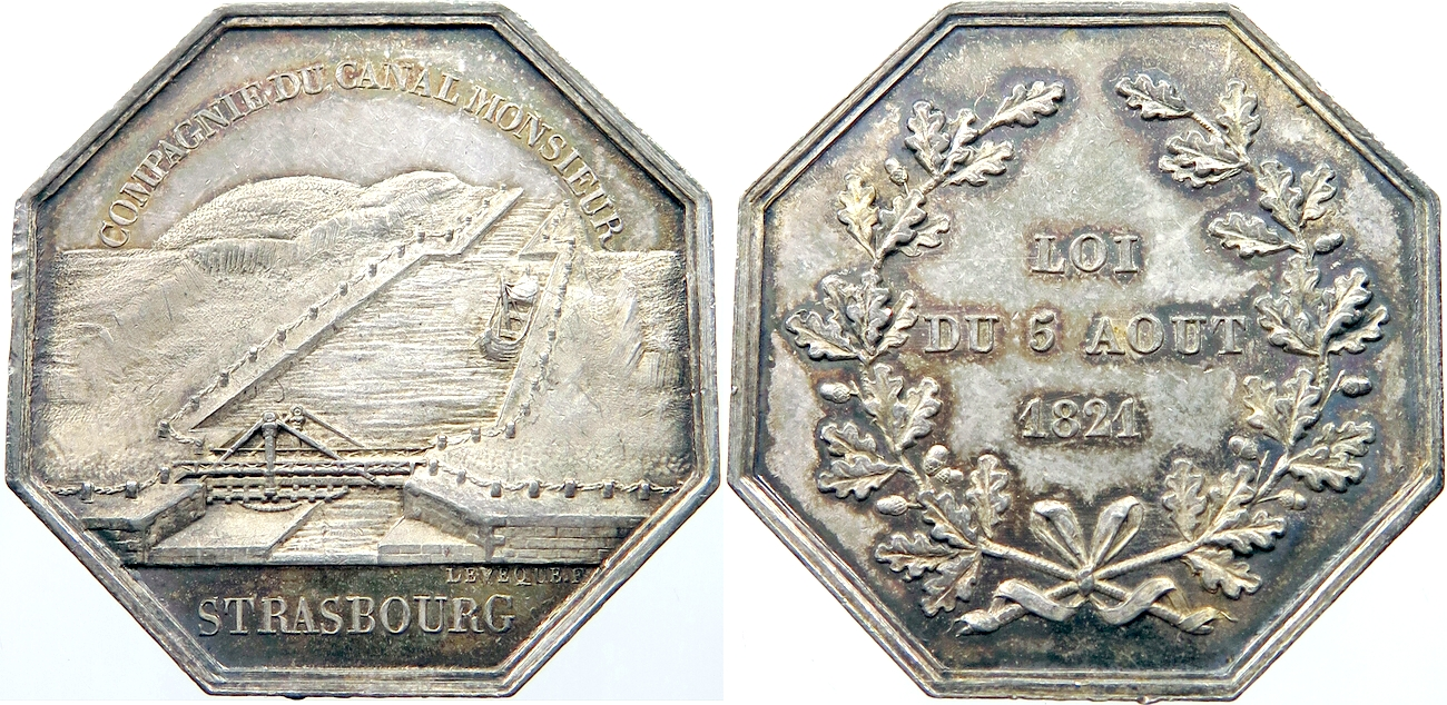 jeton canal Monsieur